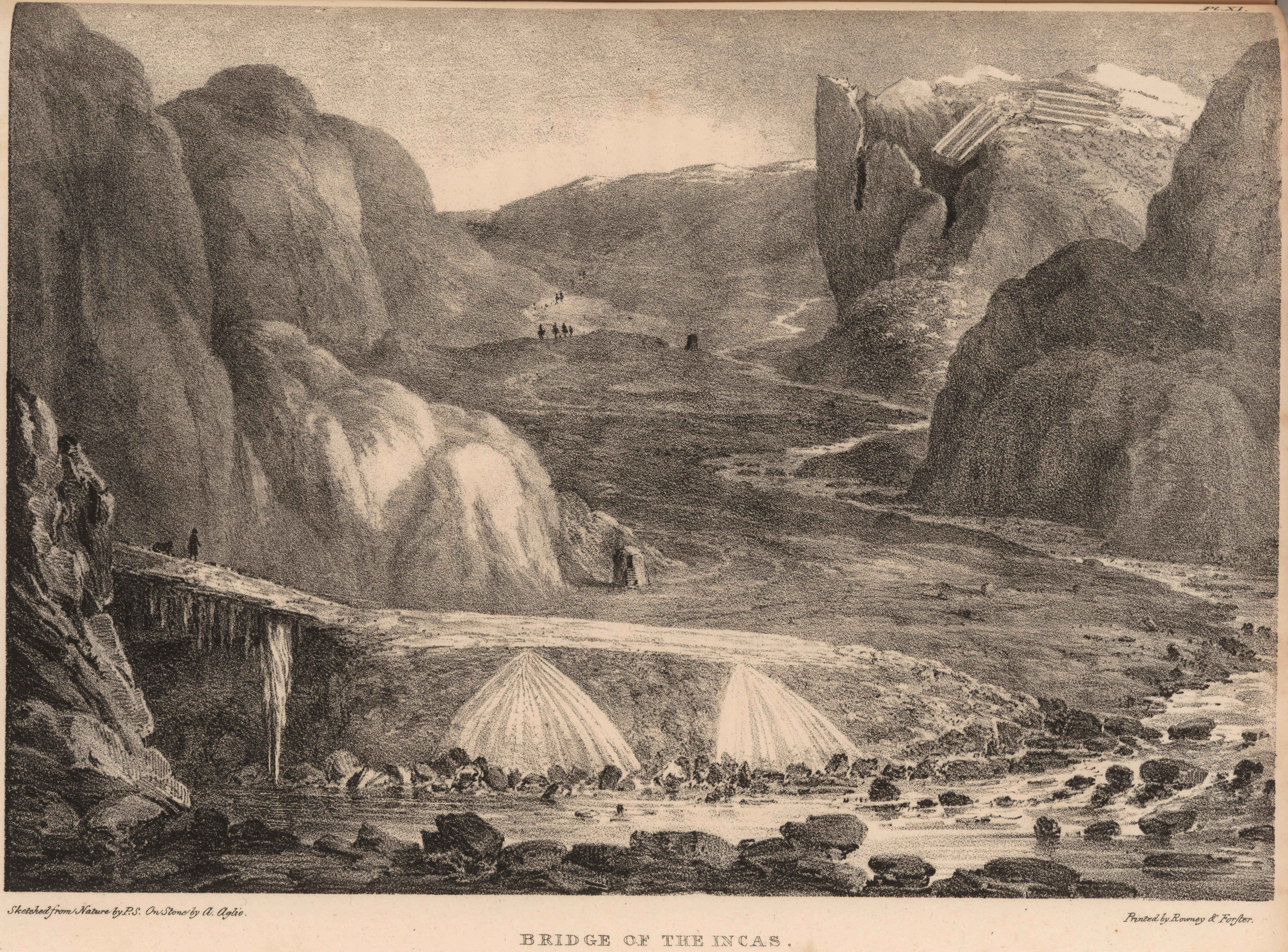 El puente del Inca es un monumento natural adyacente a la localidad del mismo nombre; se encuentra a una altitud de 2700 msnm, entre los cerros Banderita Norte y Banderita Sur, en el distrito Las Cuevas, departamento Las Heras, provincia de Mendoza, Argentina. Dibujo del viajero y filántropo inglés Peter Schmidtmeyer; litografía de Agostino Aglio; impresa por Rowney & Forster y publicada en el de libro de Schmidtmeyer Travels into Chile, over the Andes, in the years 1820 and 1821, London: Longman, Hurst, Rees, Orme, Brown and Green, 1824.